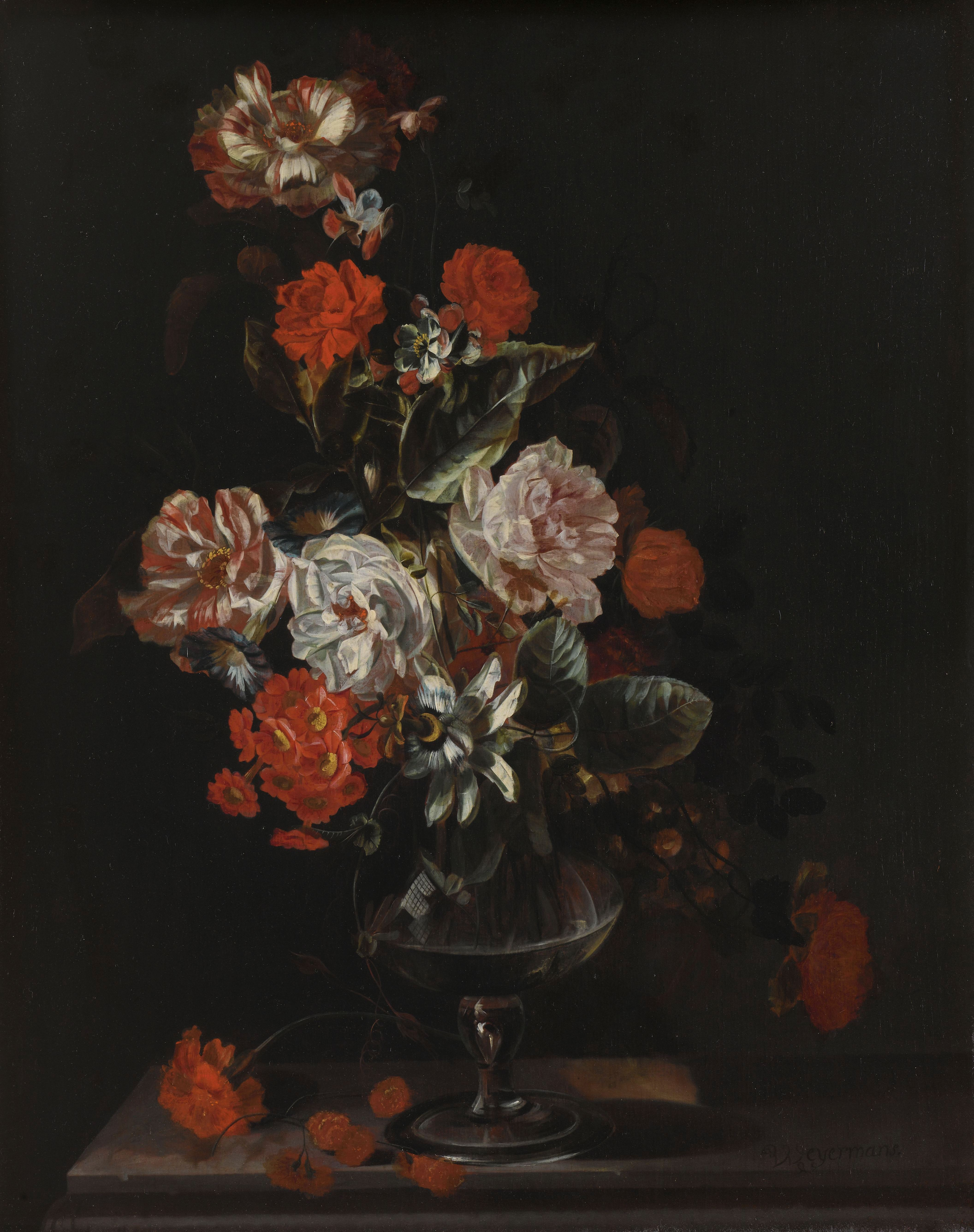 Stilleven met bloemen. Boeket bloemen met rozen, passiebloem en winde in een glazen bokaal op een tafel.